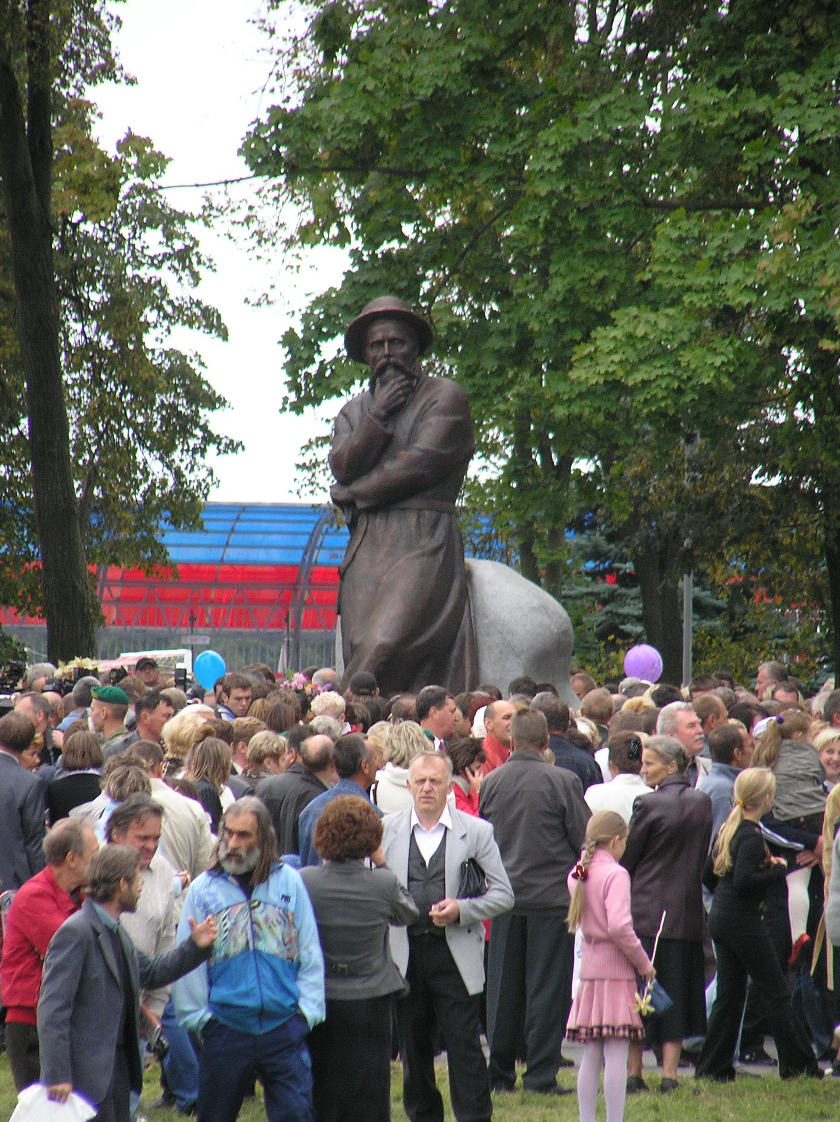 Беларуская (тарашкевіца): Смаргонь, адкрыцьцё помніку Ф. Багушэвічу